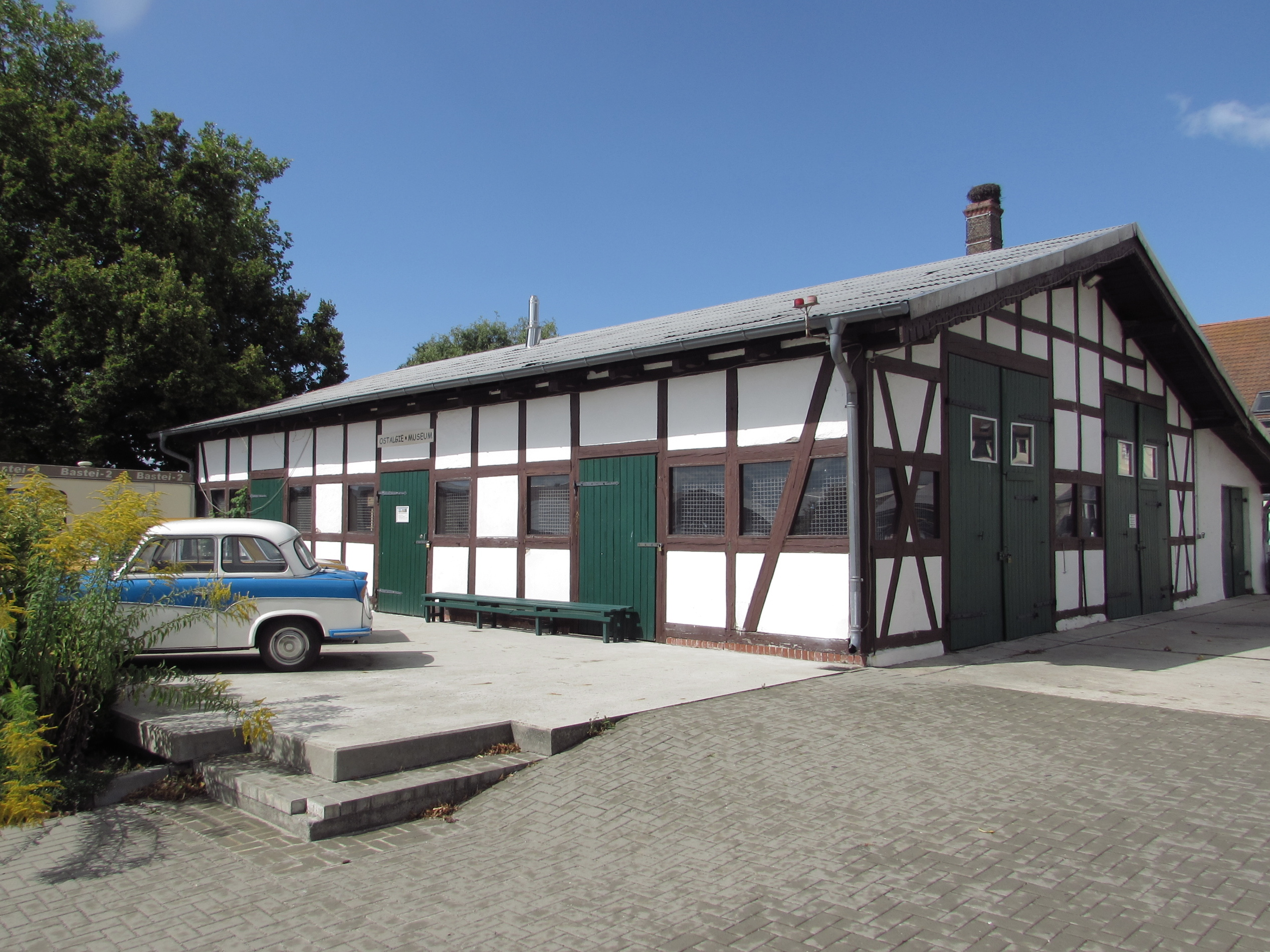 n'ostalgiemuseum moetzow